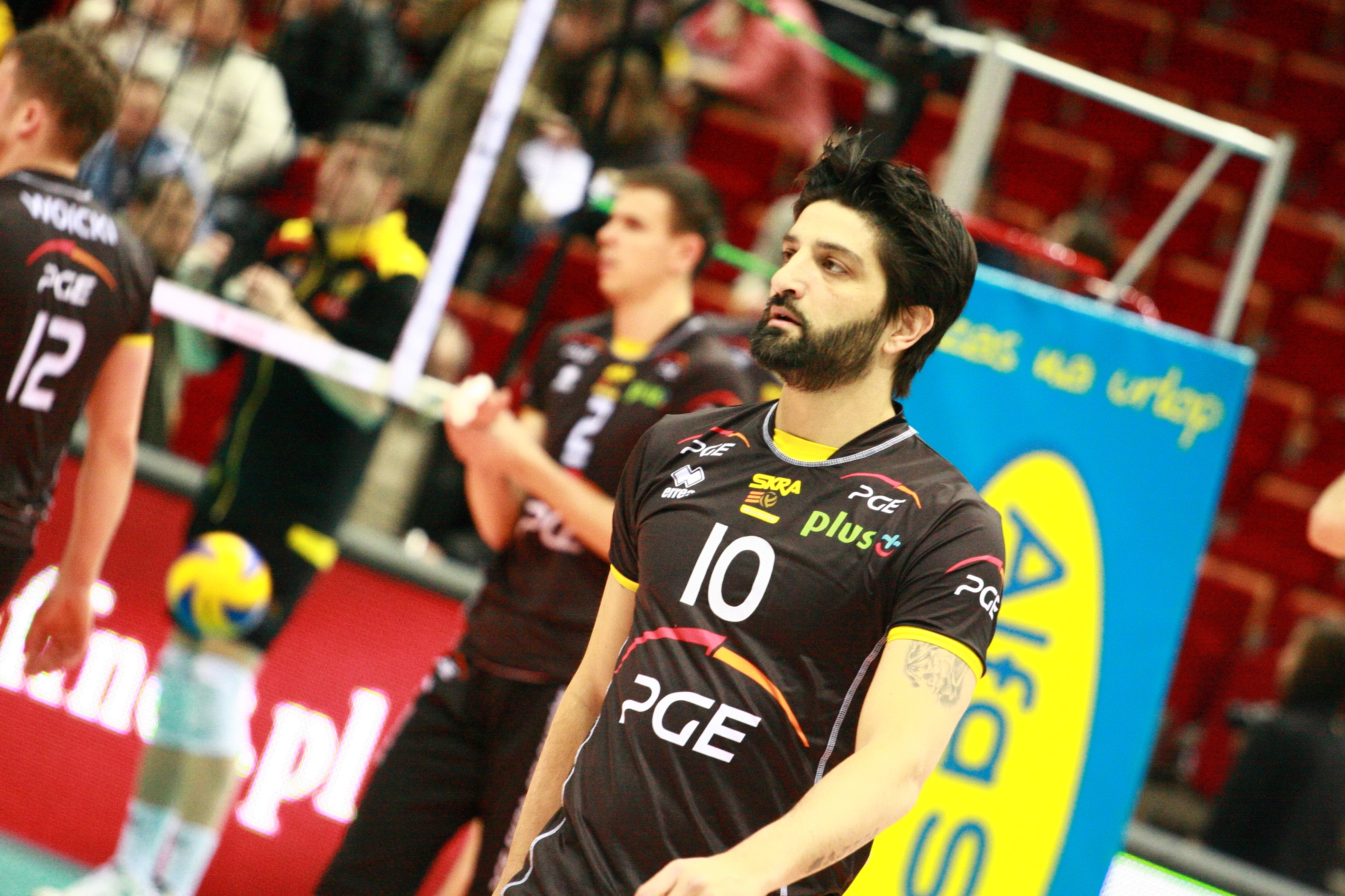 Lotos Trefl Gdańsk vs Skra Bełchatów